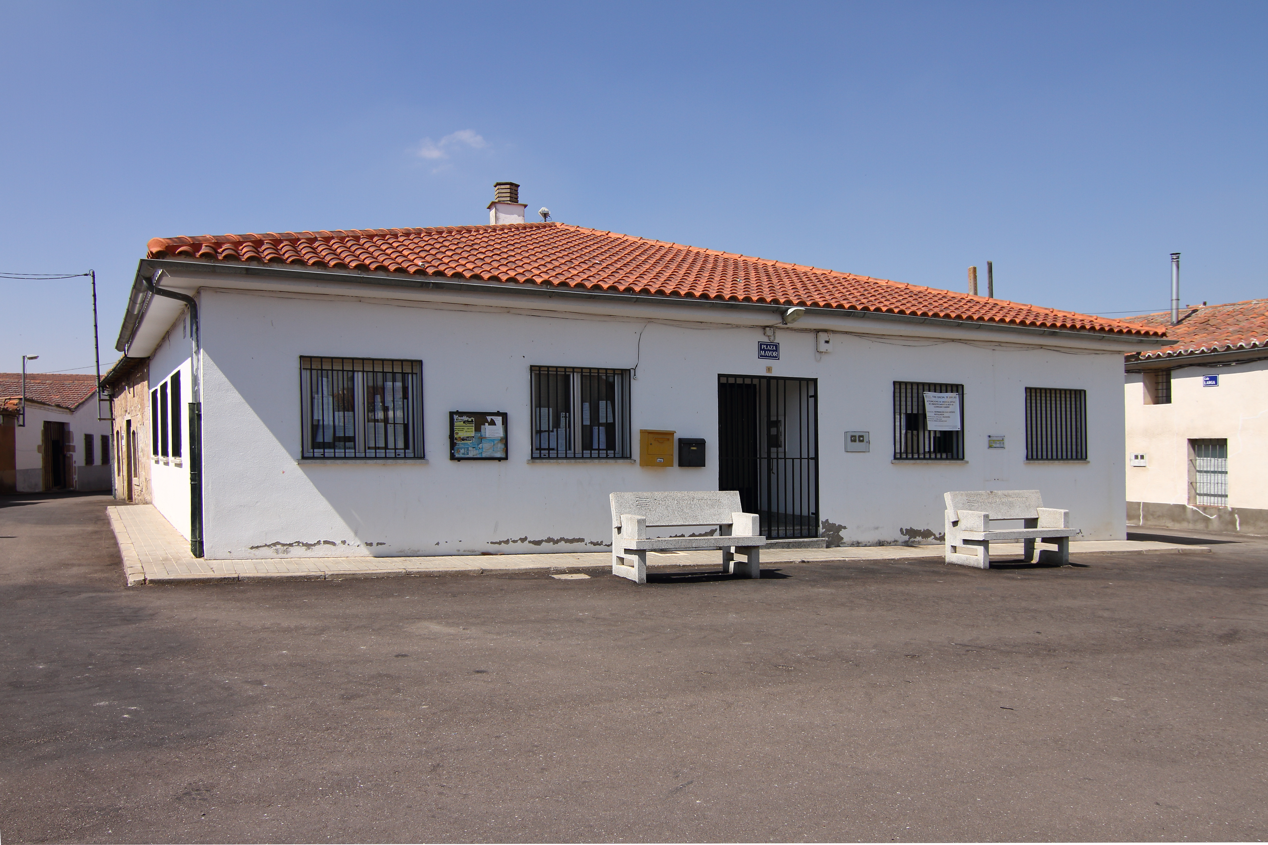 Ayuntamiento de Valdunciel